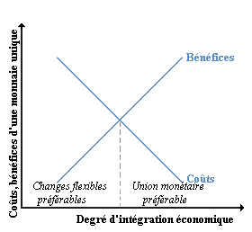 Coûts et bénéfices d'une union monétaire